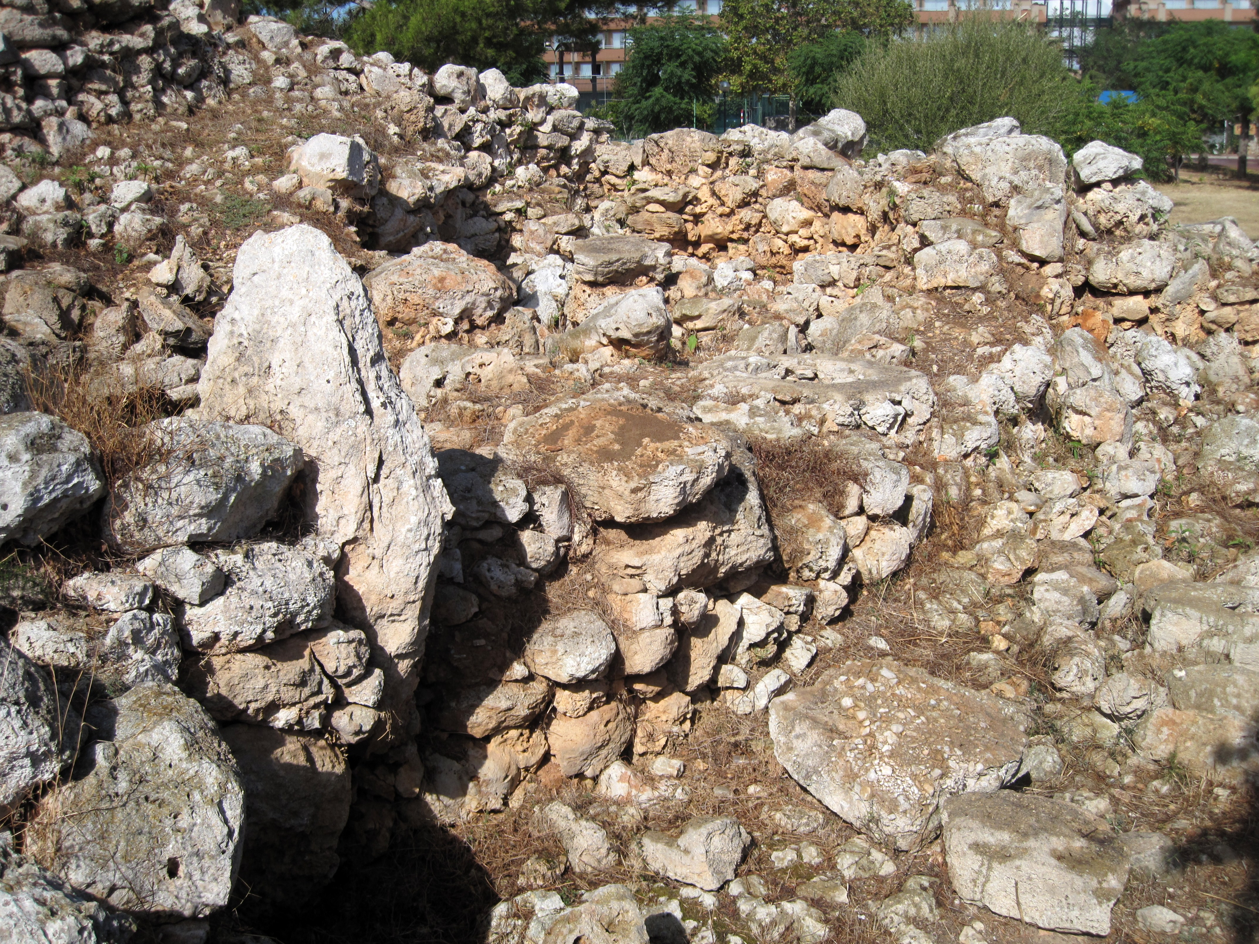 Gebäudereste im Nordosten des talaiotischen Dorfes von S’Illot (Poblat talaiòtic de s’Illot), Gemeinde Sant Llorenç des Cardassar, Mallorca, Spanien